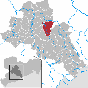 Striegistal in Saxony - district Mittelsachsen